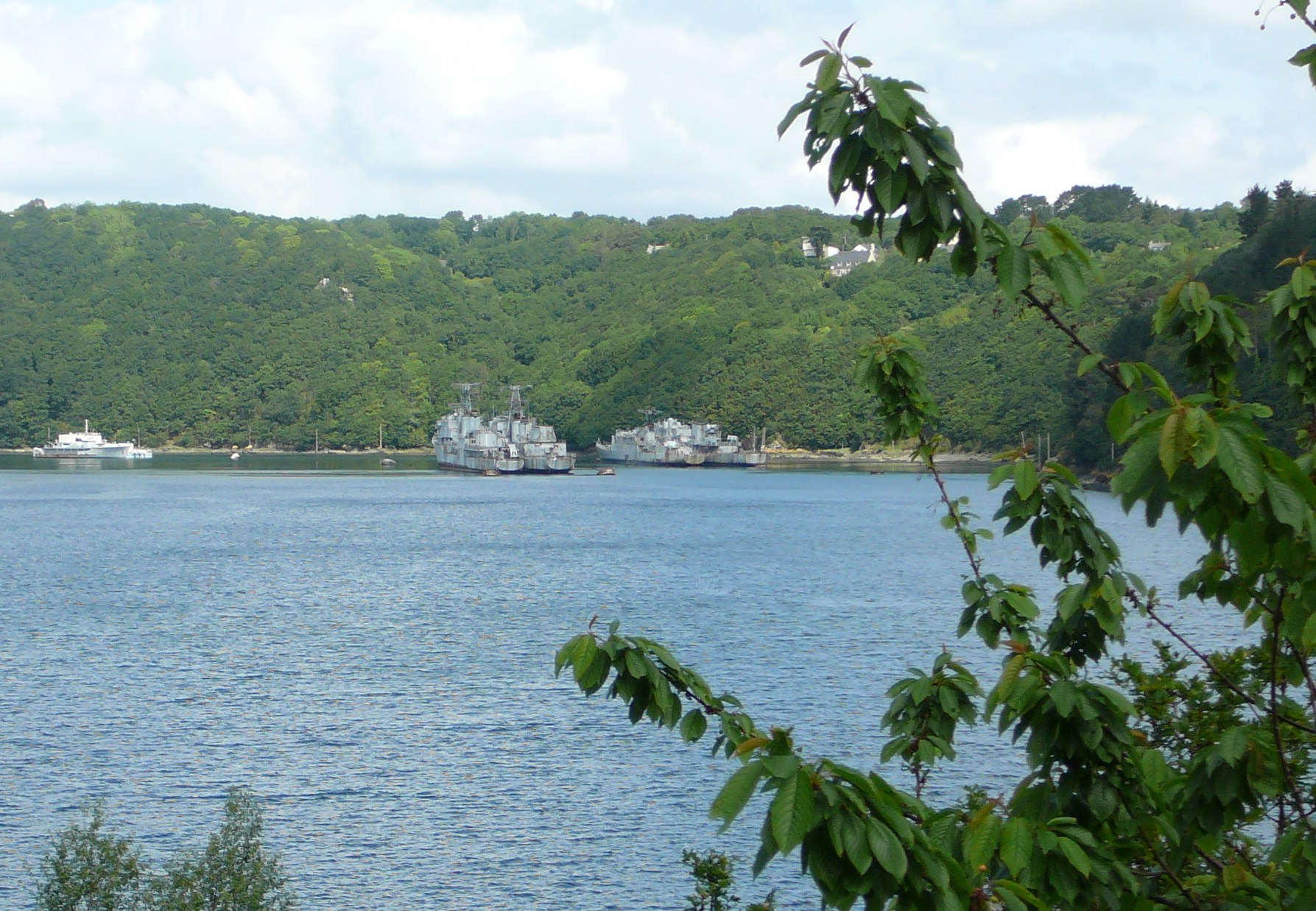 L'Aulne et le cimetière de bateaux de Landévennec